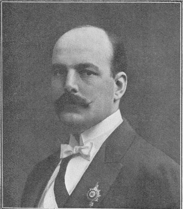 Jacques Auguste Marie Le Clerc de Juigné